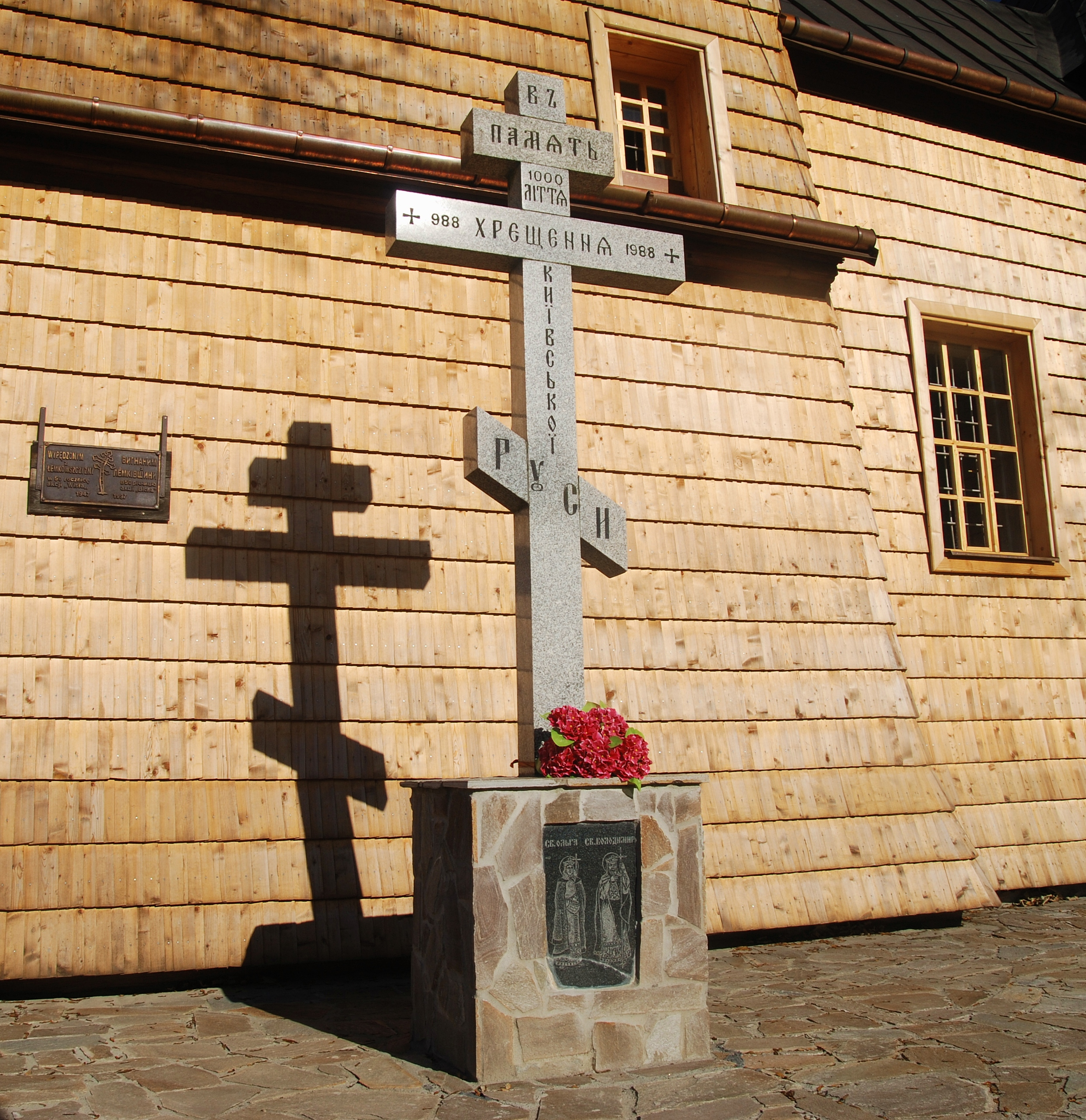 wieś Hańczowa